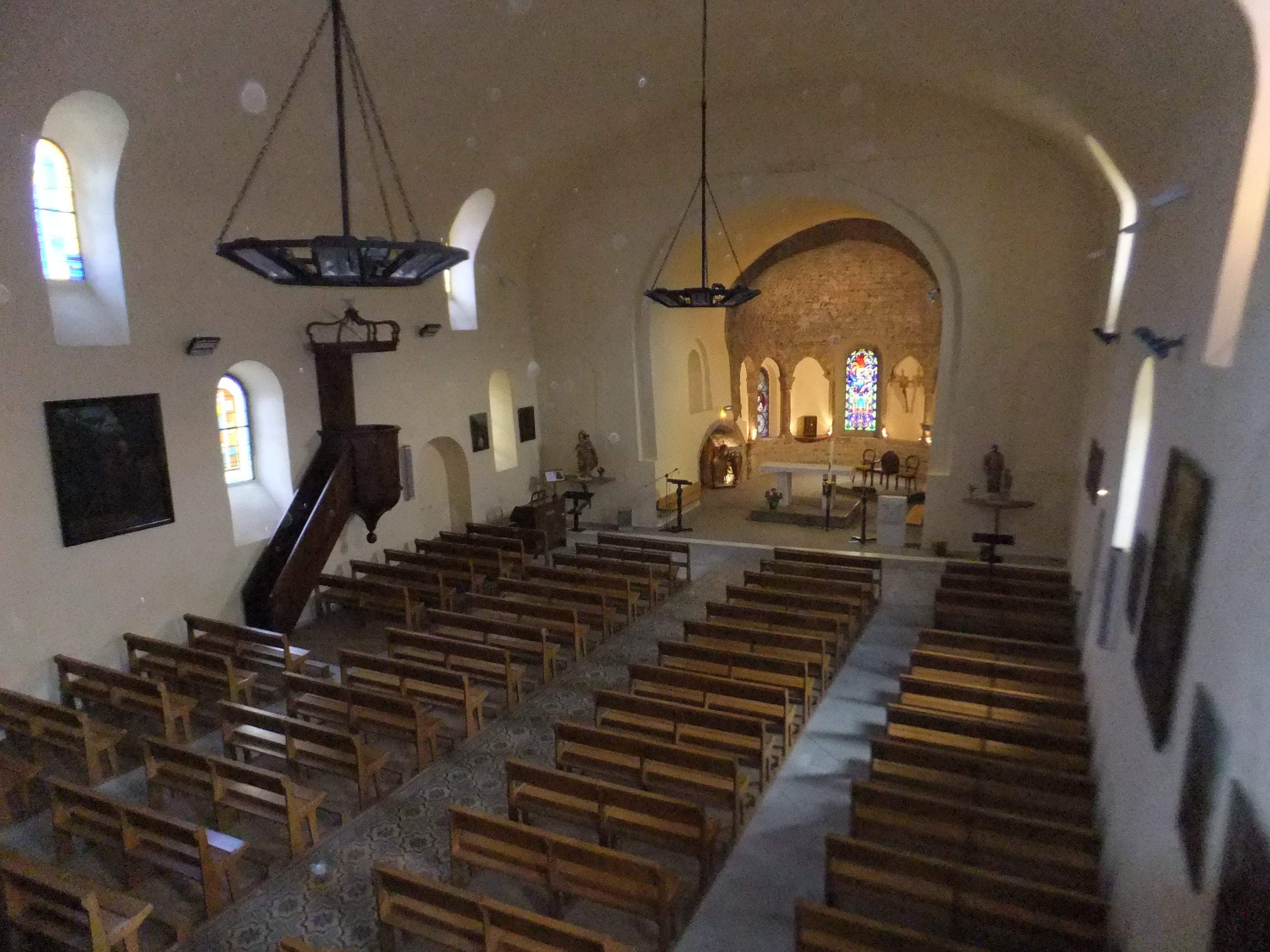 la nef de l'église de Saint-Pierre d'Allevard, vue depuis la partie droite de la tribune. Les vitraux installés coté nord sont dans les teintes froides.